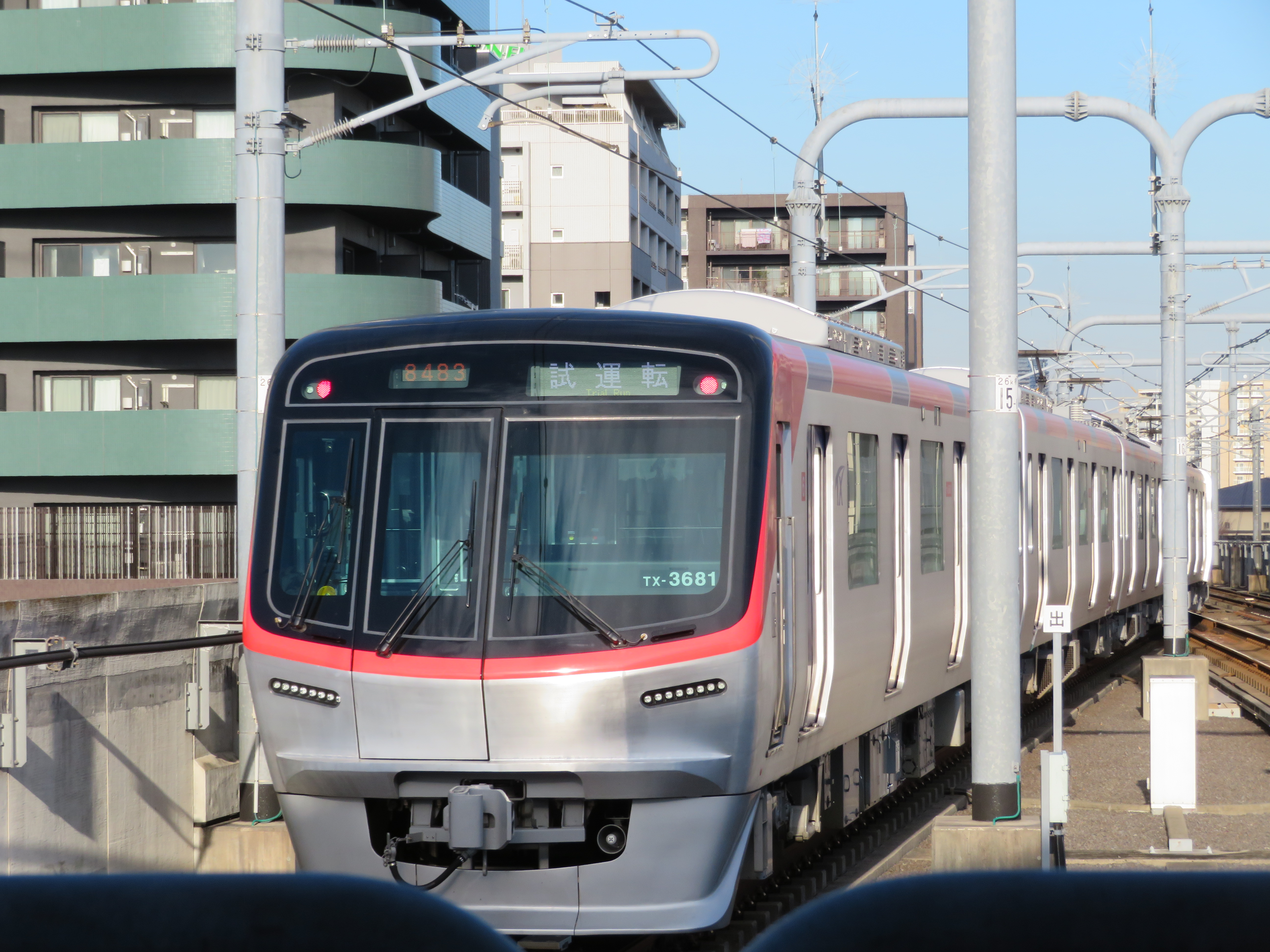 流山おおたかの森駅で撮影した。